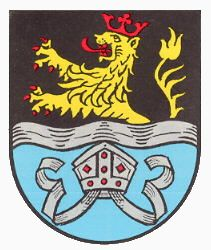 Wappen von Erdesbach